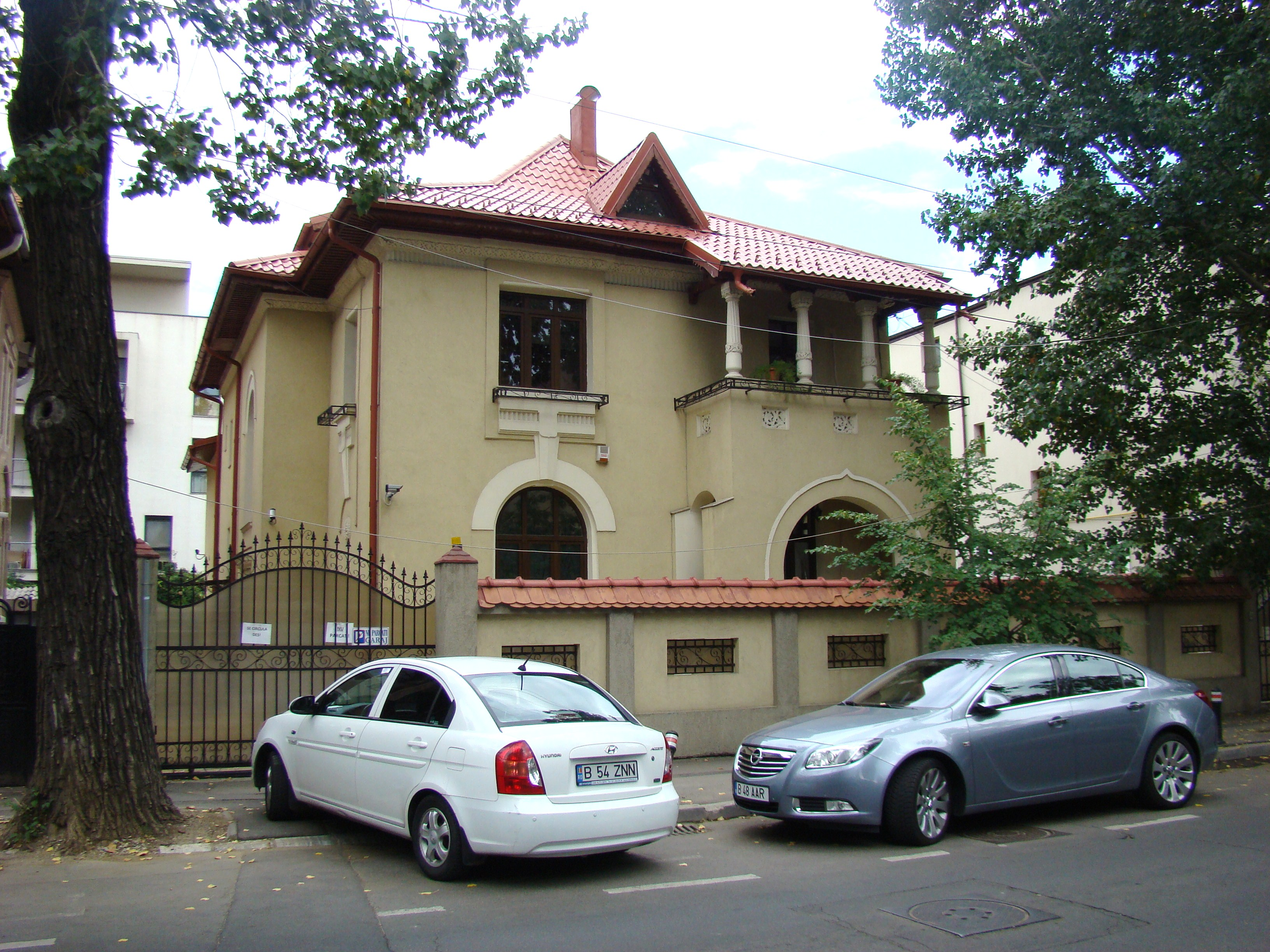 Casă monument istoric, str. Roma, nr. 20